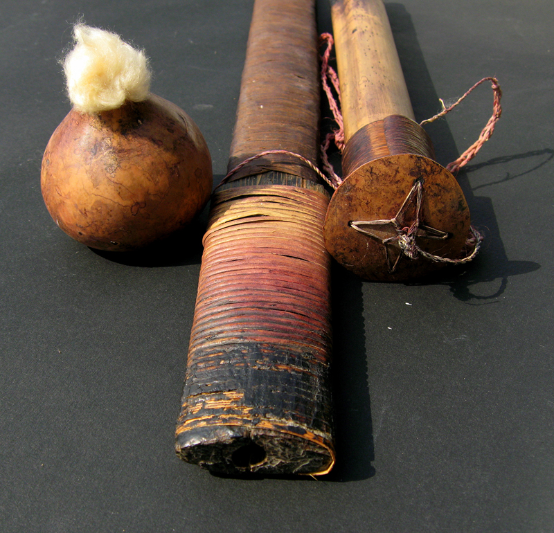 Ethnographie Huaorani